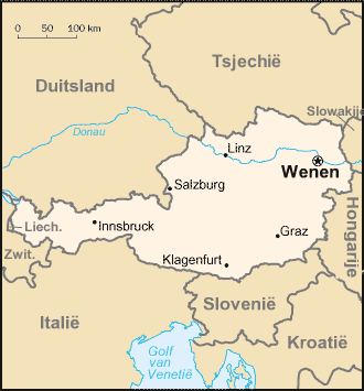 Oorspronkelijk uit CIA Factbook; vertaald in Nederlands door Danielm; omgezet in PNG door mij